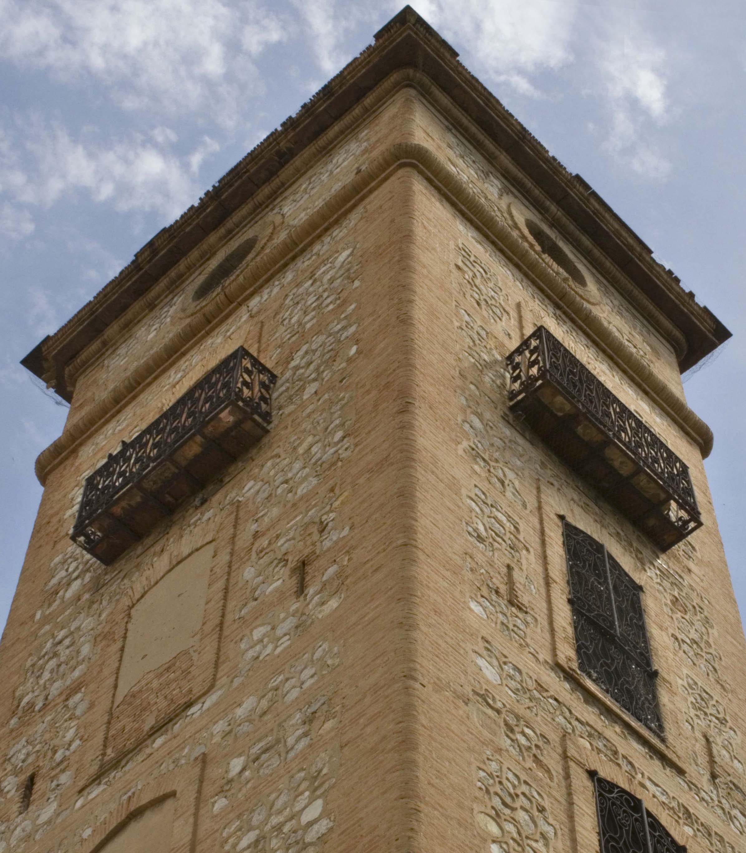 Torre d'Alginet del segle XIX. Arquitectura burgesa valenciana.